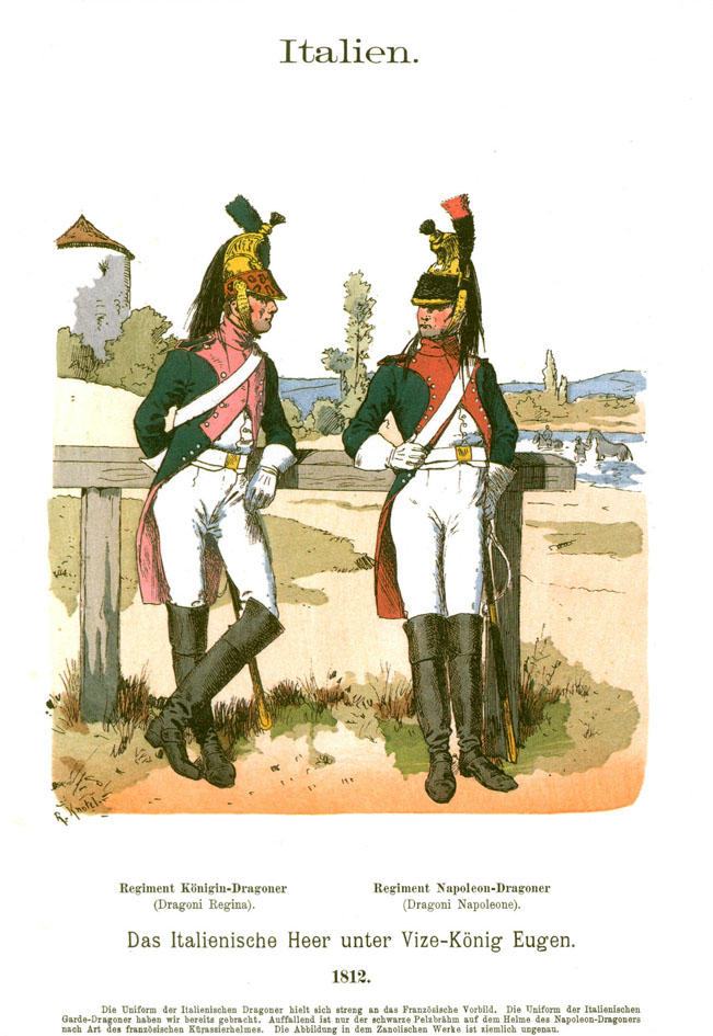 Иллюстрация Рихарда Кнотеля